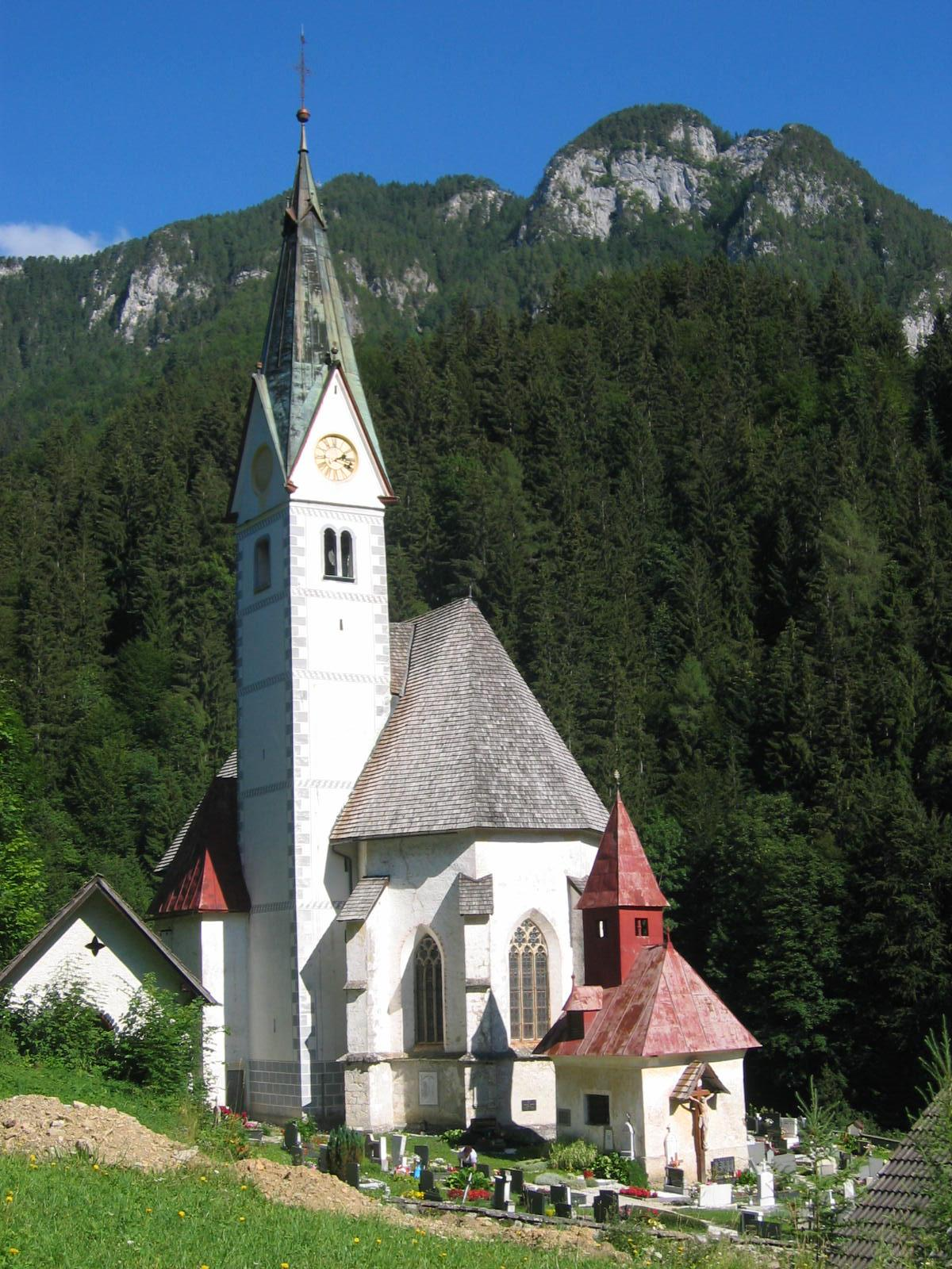 Marija Snežna (Maria of Snow), church in Solčava, Slovenia photo:Ziga 20:10, 18 August 2006 (UTC)